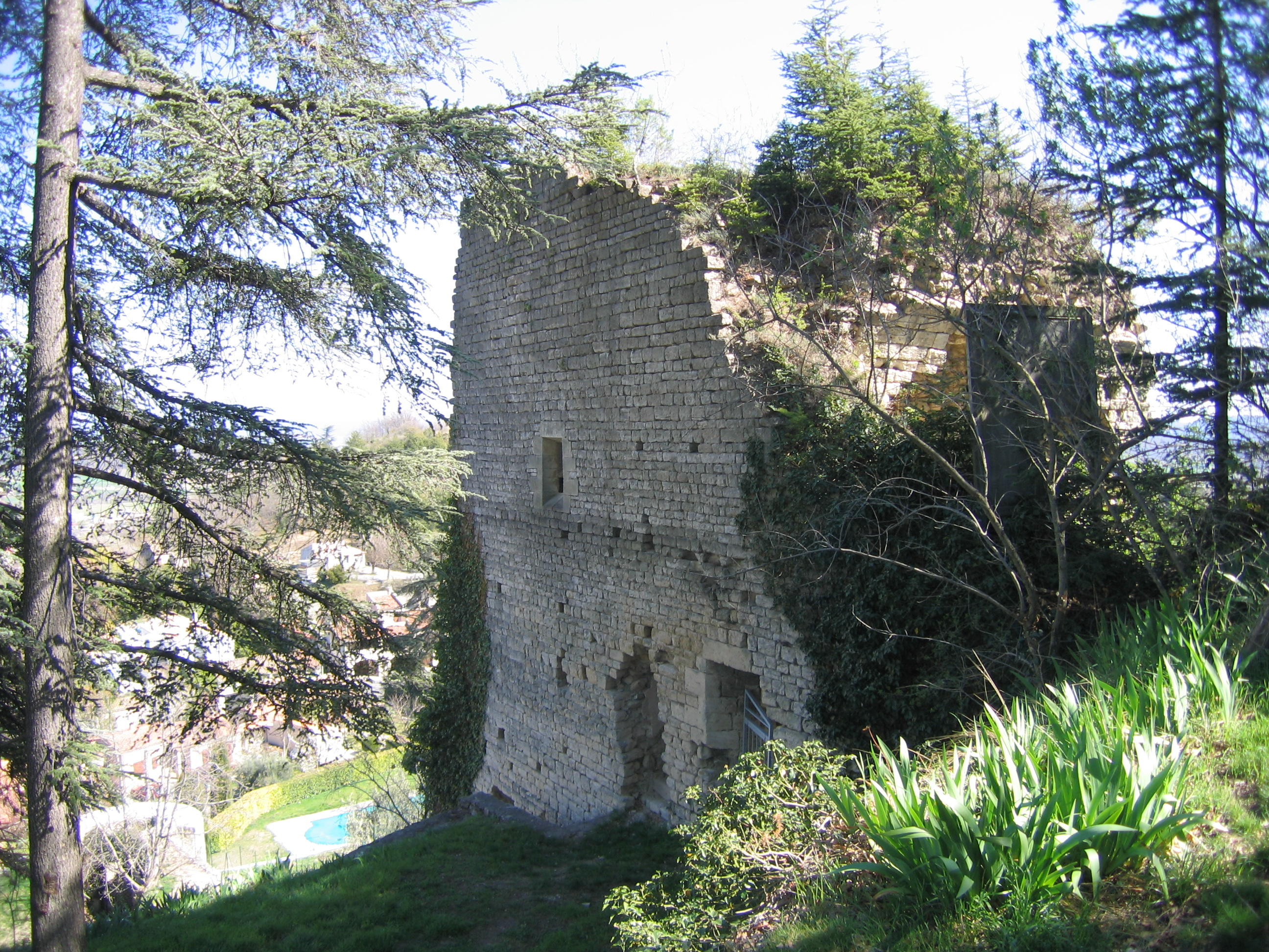 Tour de l'évêque (cathédrale Saint-Mari de Forcalquier